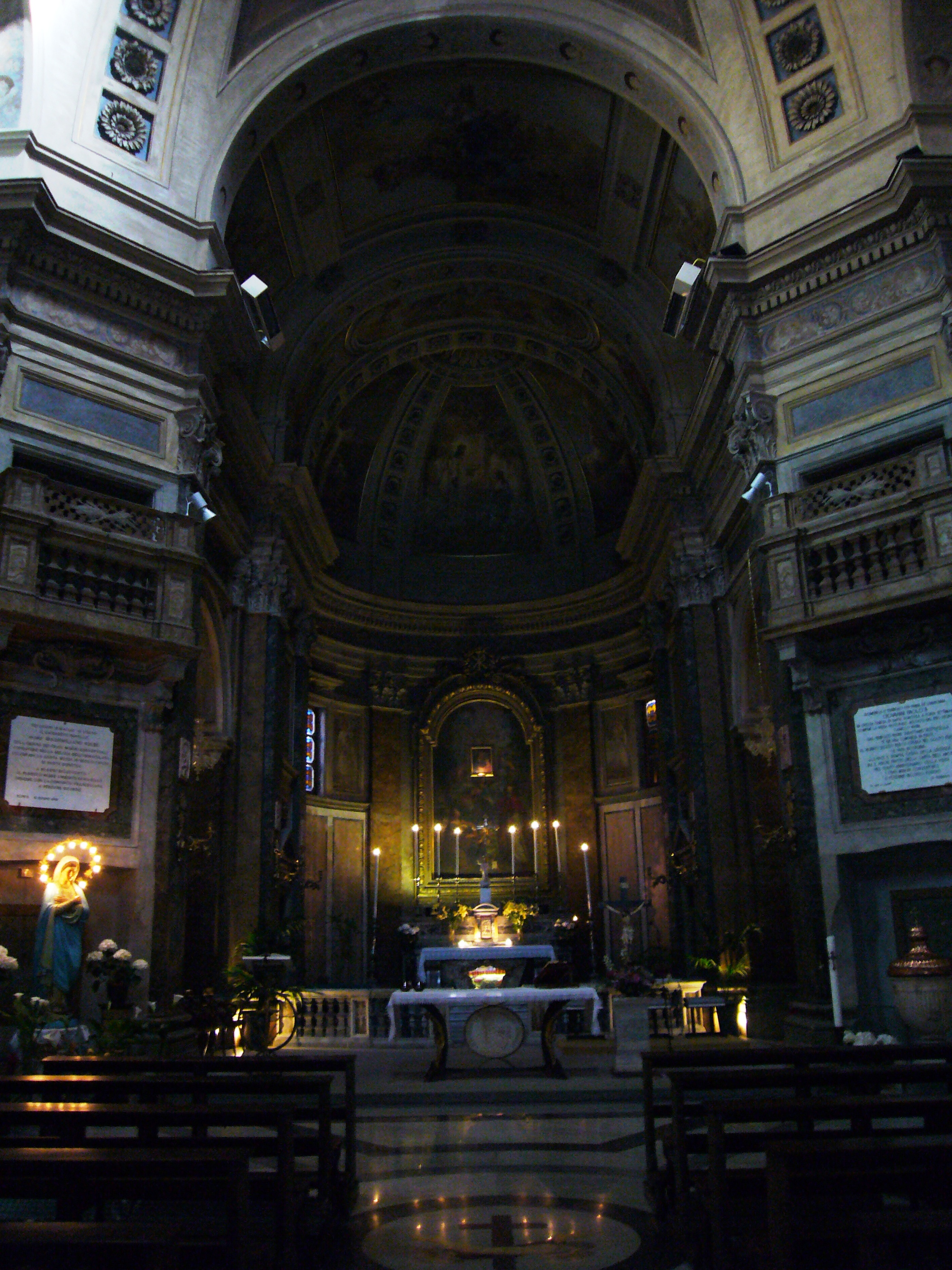 Roma, santa Dorotea, interno